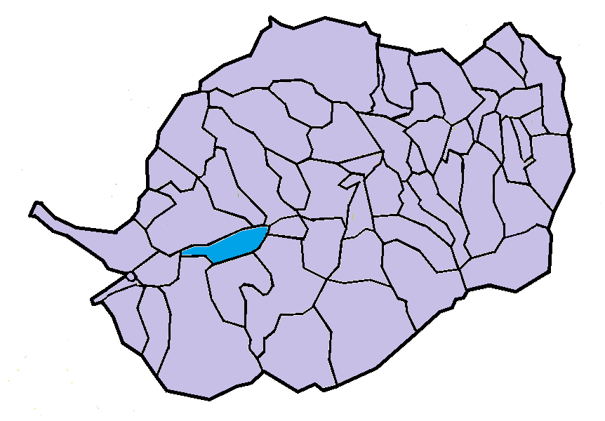 Canavelles en el Conflent, a partir del mapa municipal del Conflent de lliure disposició adaptat al Nomenclàtor toponímic aprovat el 2007